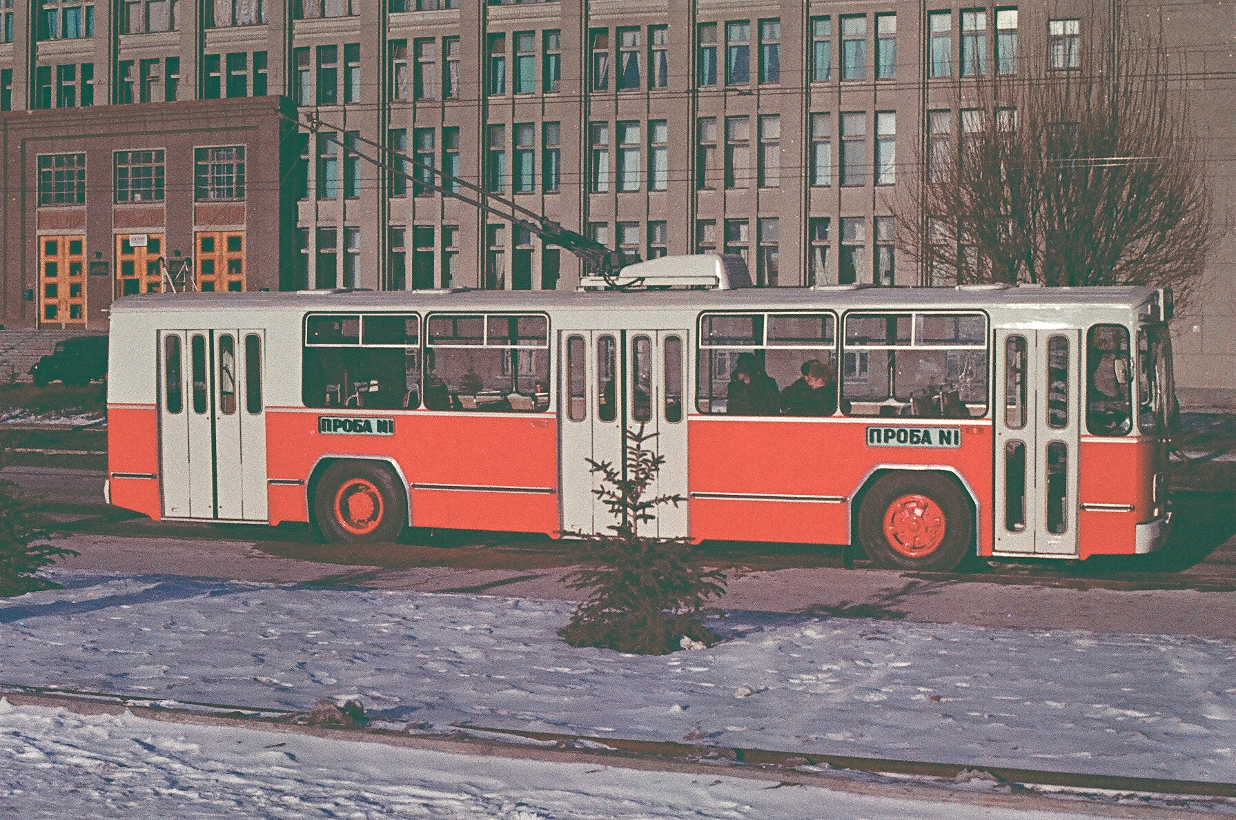 ЗиУ-9, ул. Московская в Саратове